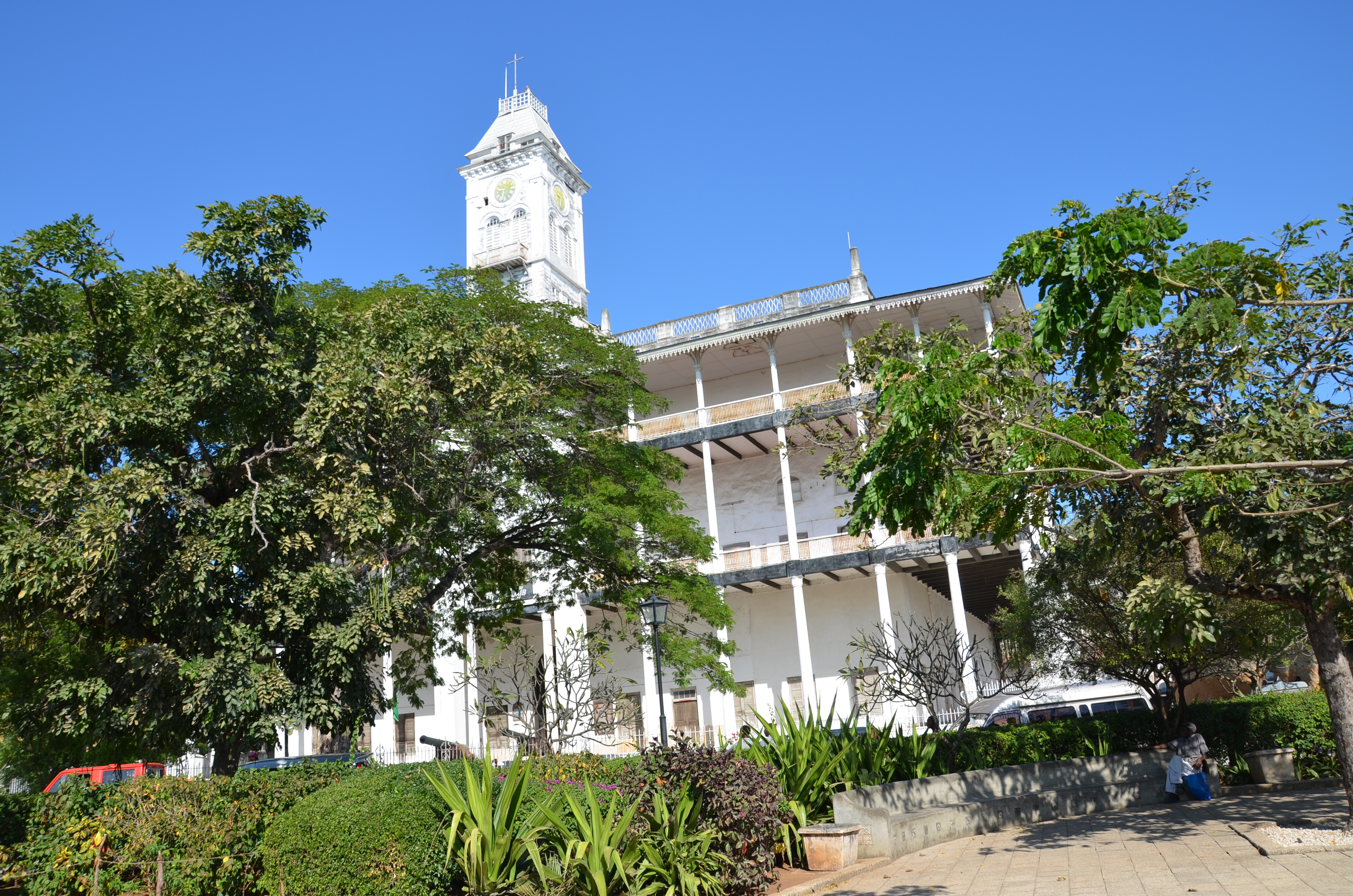 Beit al Ajaib (House of Wonders, Haus der Wunder)